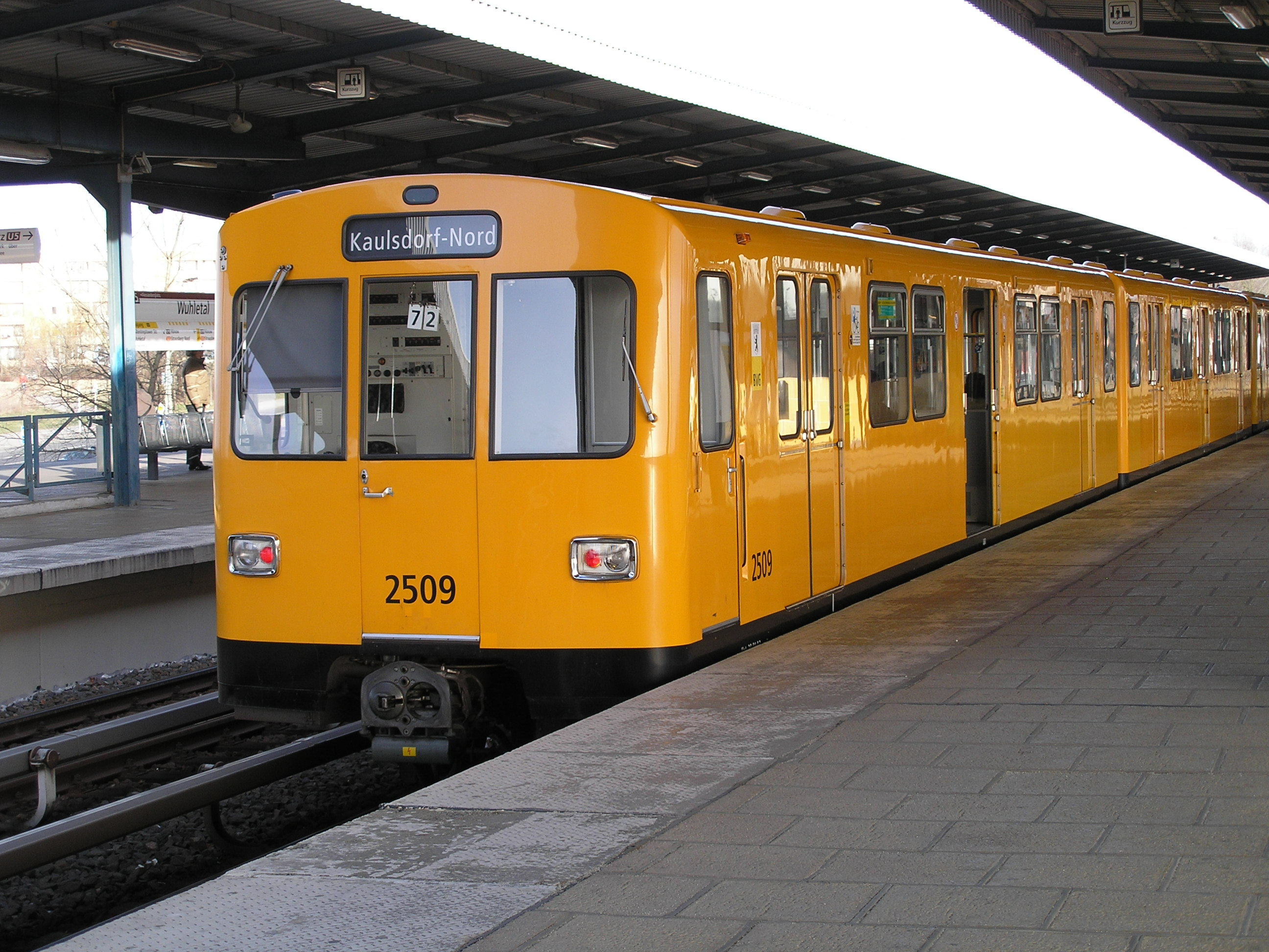 Zug der Berliner U-Bahn auf der Linie U5 mit Ziel Kaulsdorf-Nord, abgebildeter Wagen 2509 gehört zur Baureihe F74, aufgenommen am kombinierten S- und U-Bahnhof Wuhletal